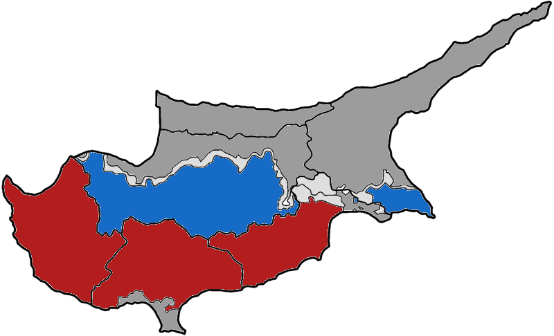 Αποτελέσματα ευρωεκλογών 2009 ανά επαρχία